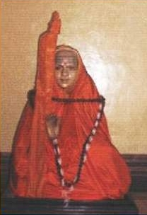 by Hanumandas - Statue at the Shankaracharya Mandir in Allahabad